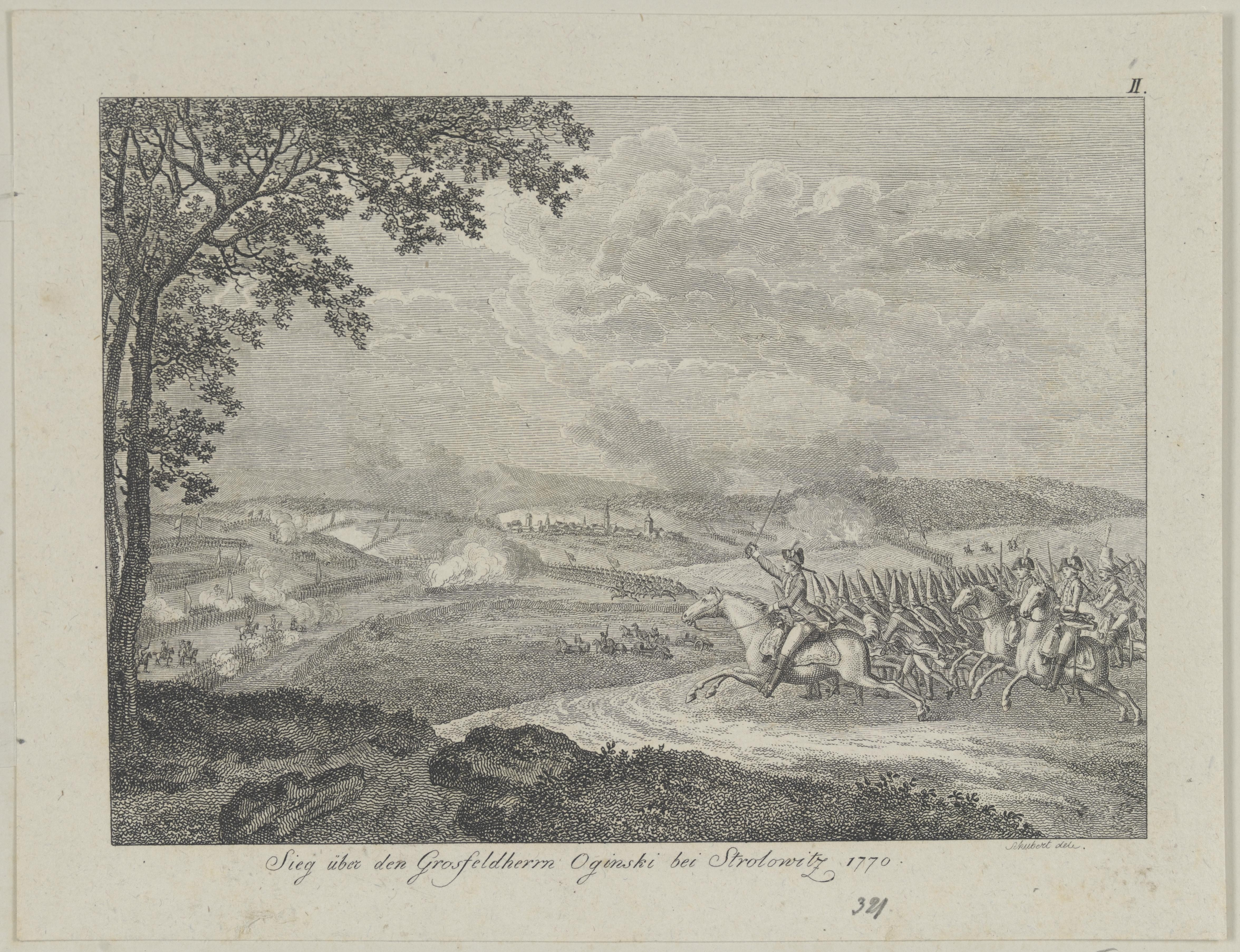 Беларуская (тарашкевіца): Бітва пад Сталавічамі (Stałavičy)